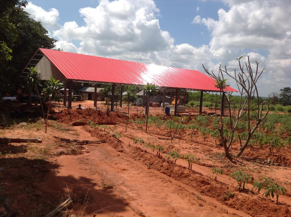 ภาพท่านโดยท่าน พระอาจารย์อานนท์ ฐิตฺชฺโย